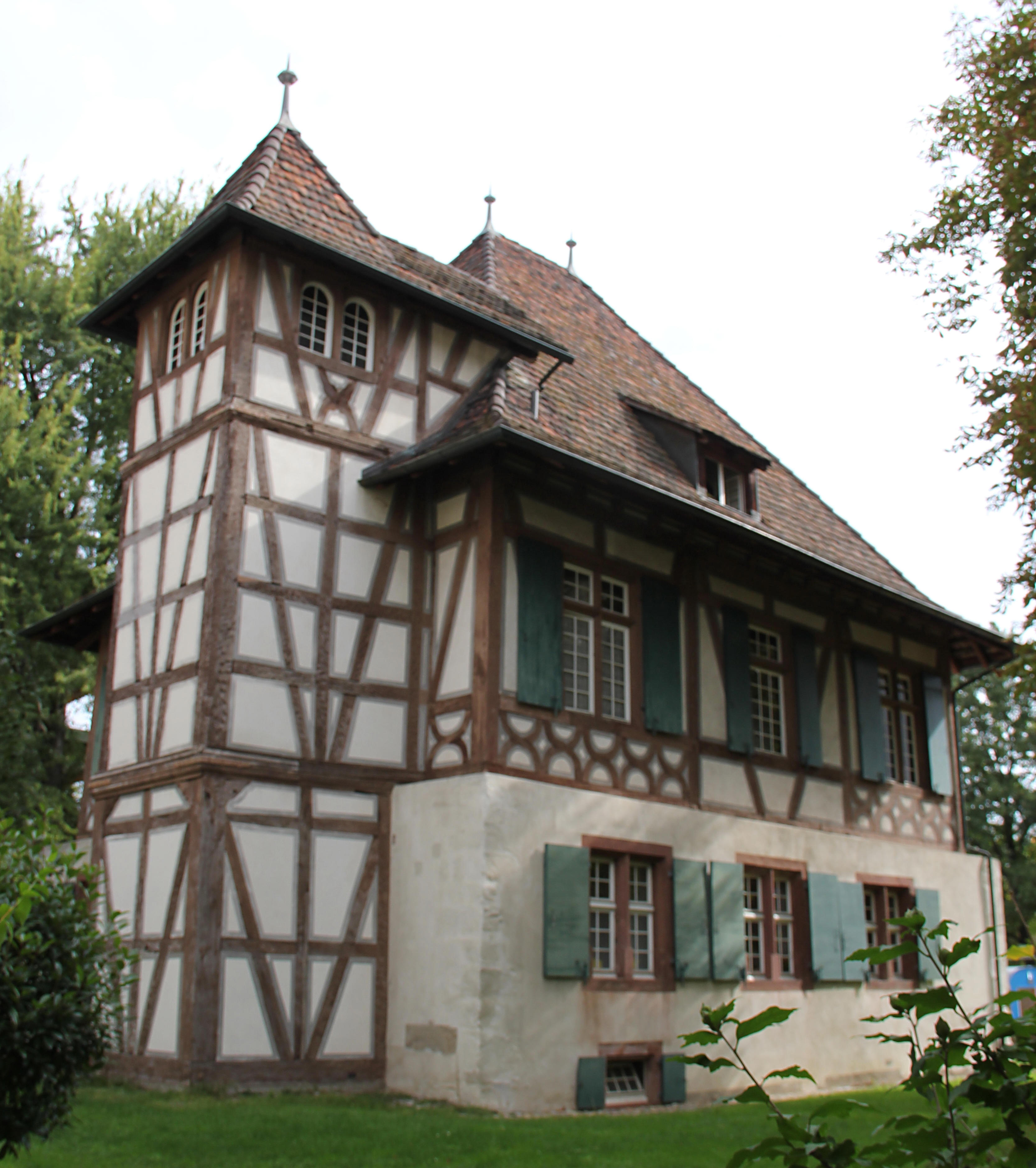 BS Schlösschen gundeldingen